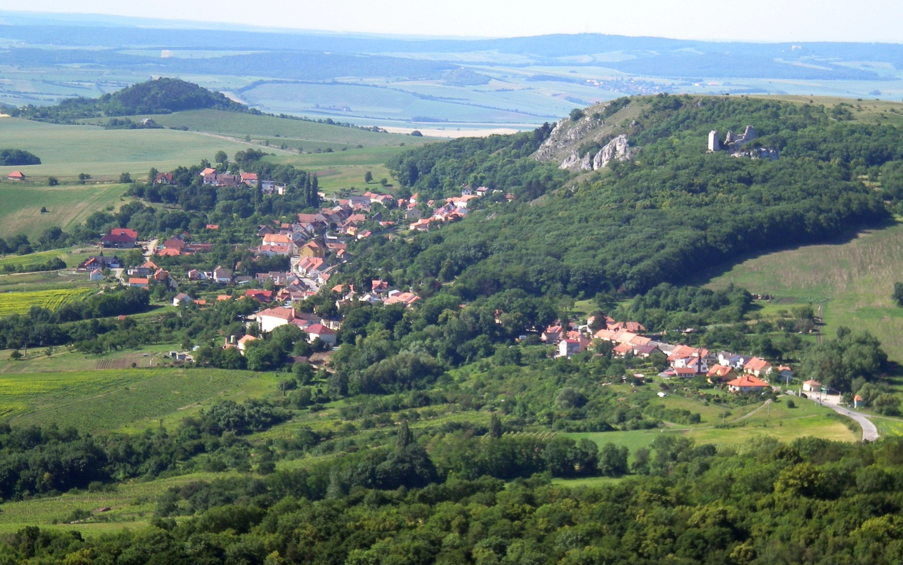 Klentnice a Sirotčí hrádek, pohled z Děvína